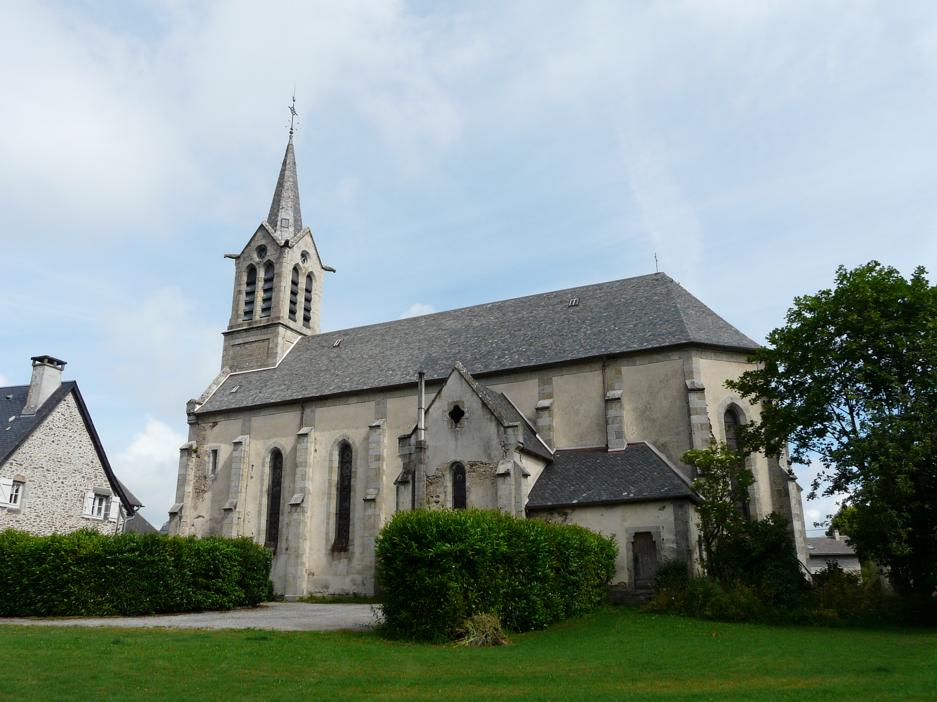 L'église Saint-Étienne, Saint-Étienne-aux-Clos, Corrèze, France.